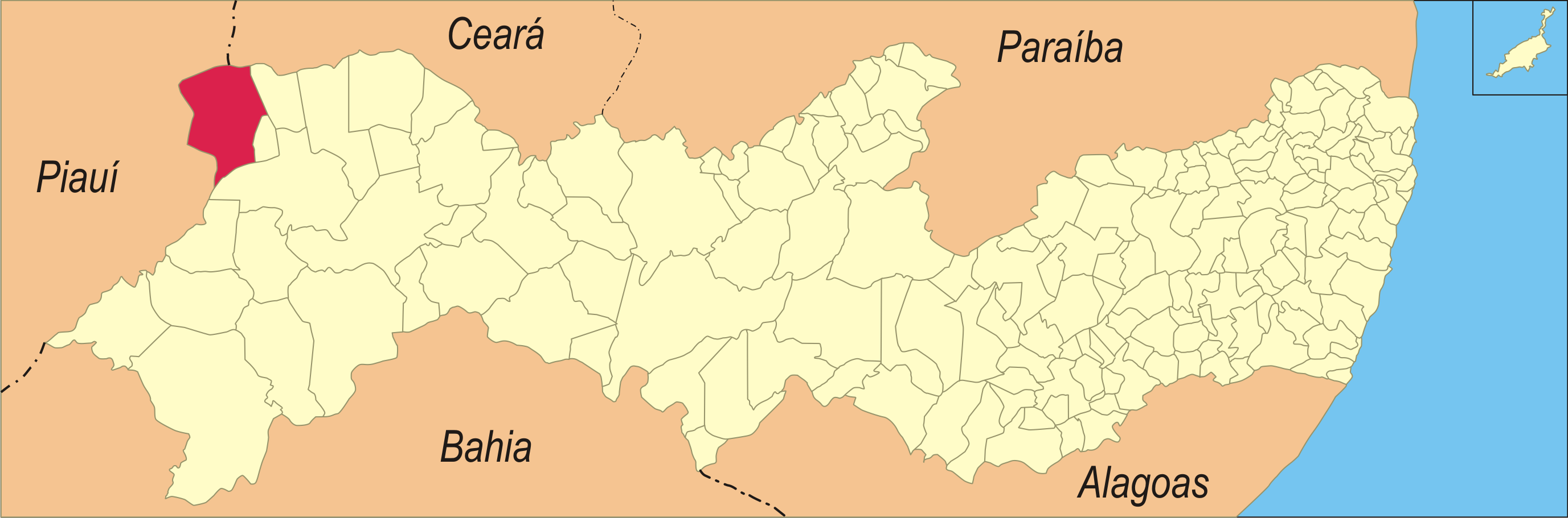 Localização da cidade no estado de Pernambuco